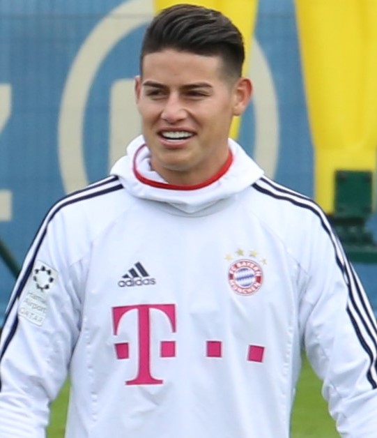 James Rodríguez beim Training auf dem Gelände des FC Bayern München (Januar 2018)